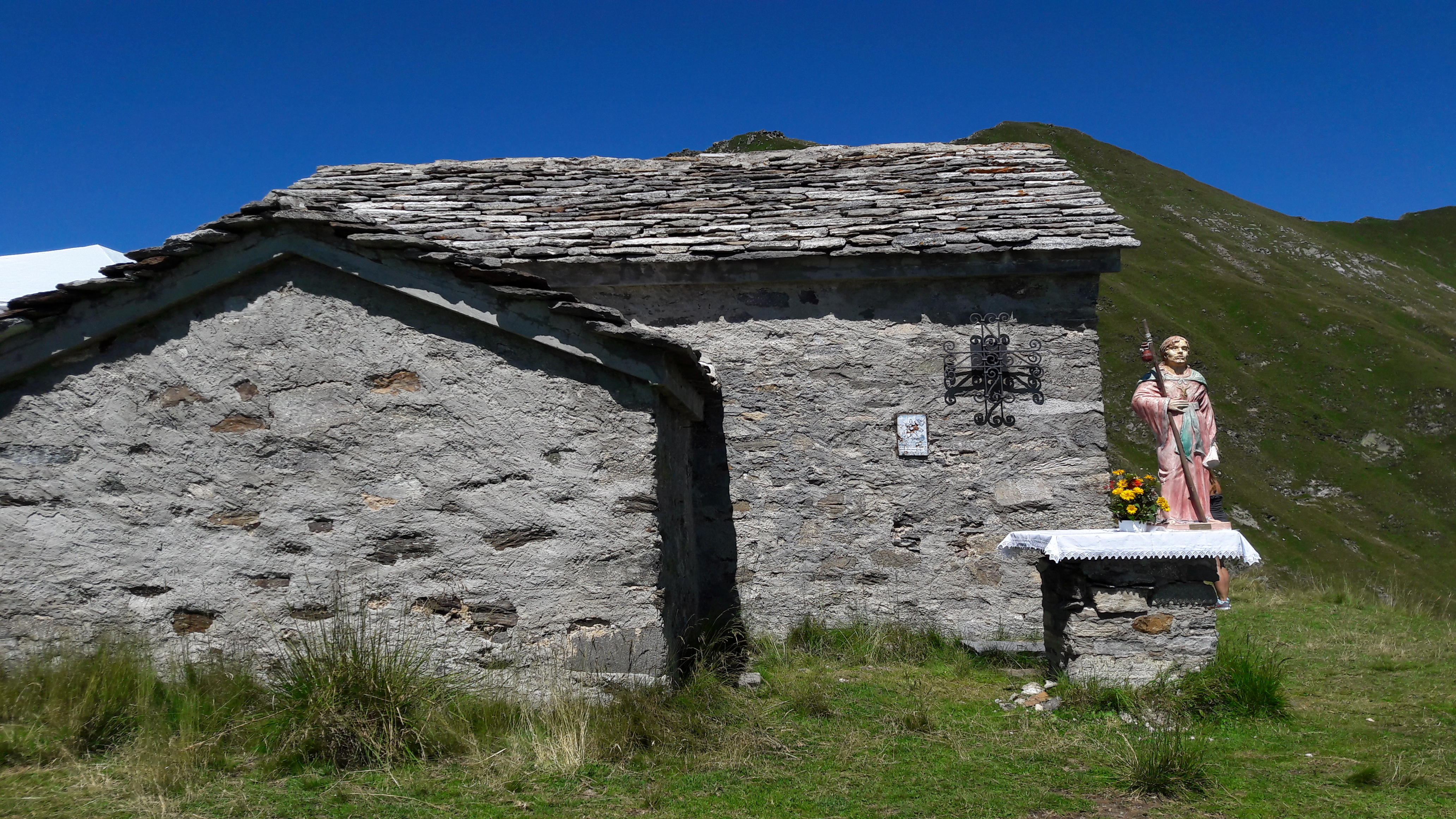 Viene raffigurata la chiesetta e la statua del santo posta sull'altare ove viene celebrata la Messa in occasione della festa.